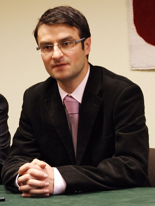 Tomasz Poręba - polski europoseł